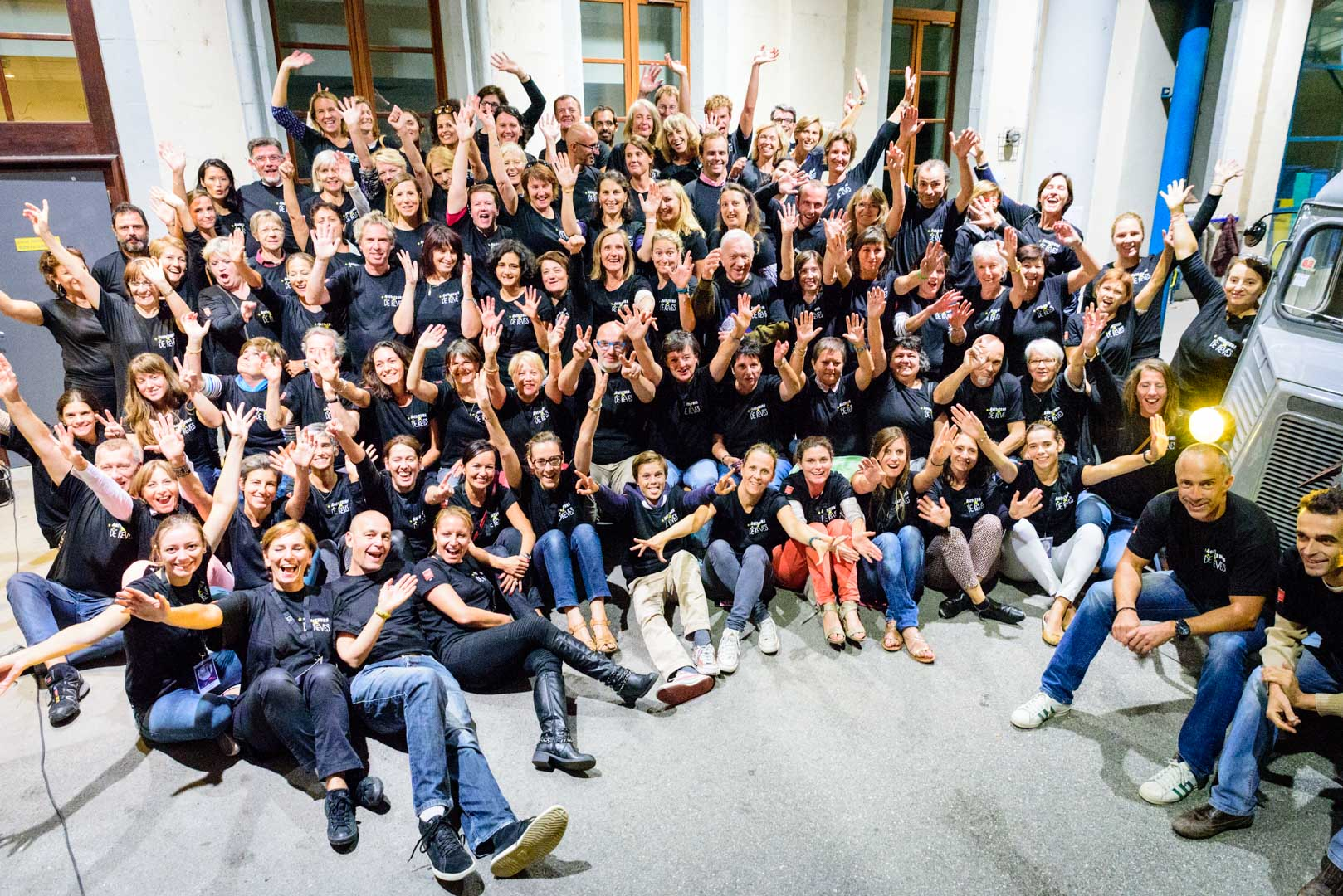 Les bénévoles du festival Coup de Théâtre 2015 (Photo donnée par François Blin)